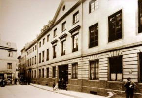 Weihergarten